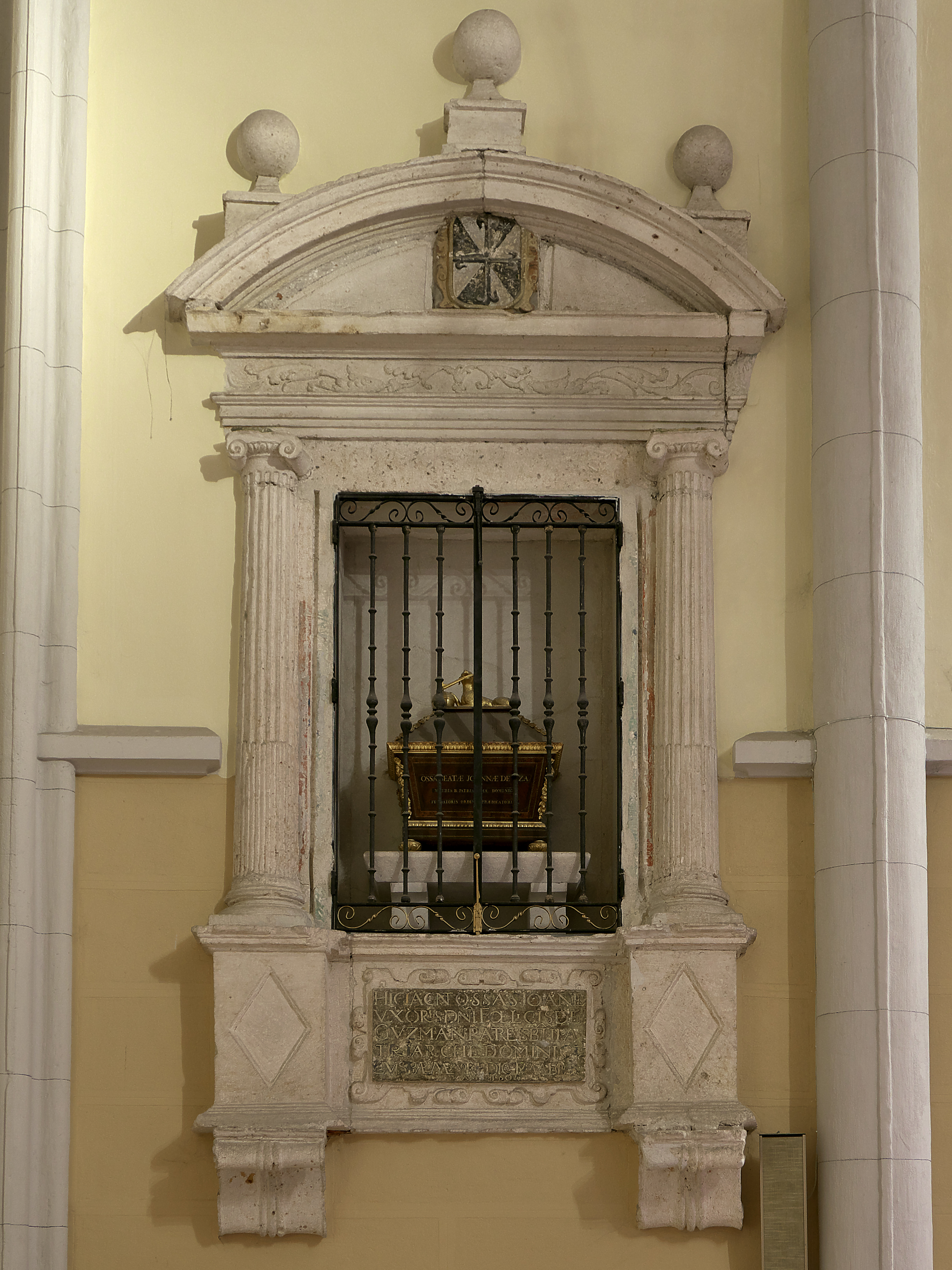 El infante don Manuel de Castilla funda (1324) el convento de Convento de San Juan y San Pablo (Peñafiel) como panteón familiar, bajo la custodia de la orden dominicana. Traslada desde el Monasterio de San Pedro (Gumiel) a su capilla mayor, los restos de Juana de Aza (†1205), madre de santo Domingo de la Caleruega.